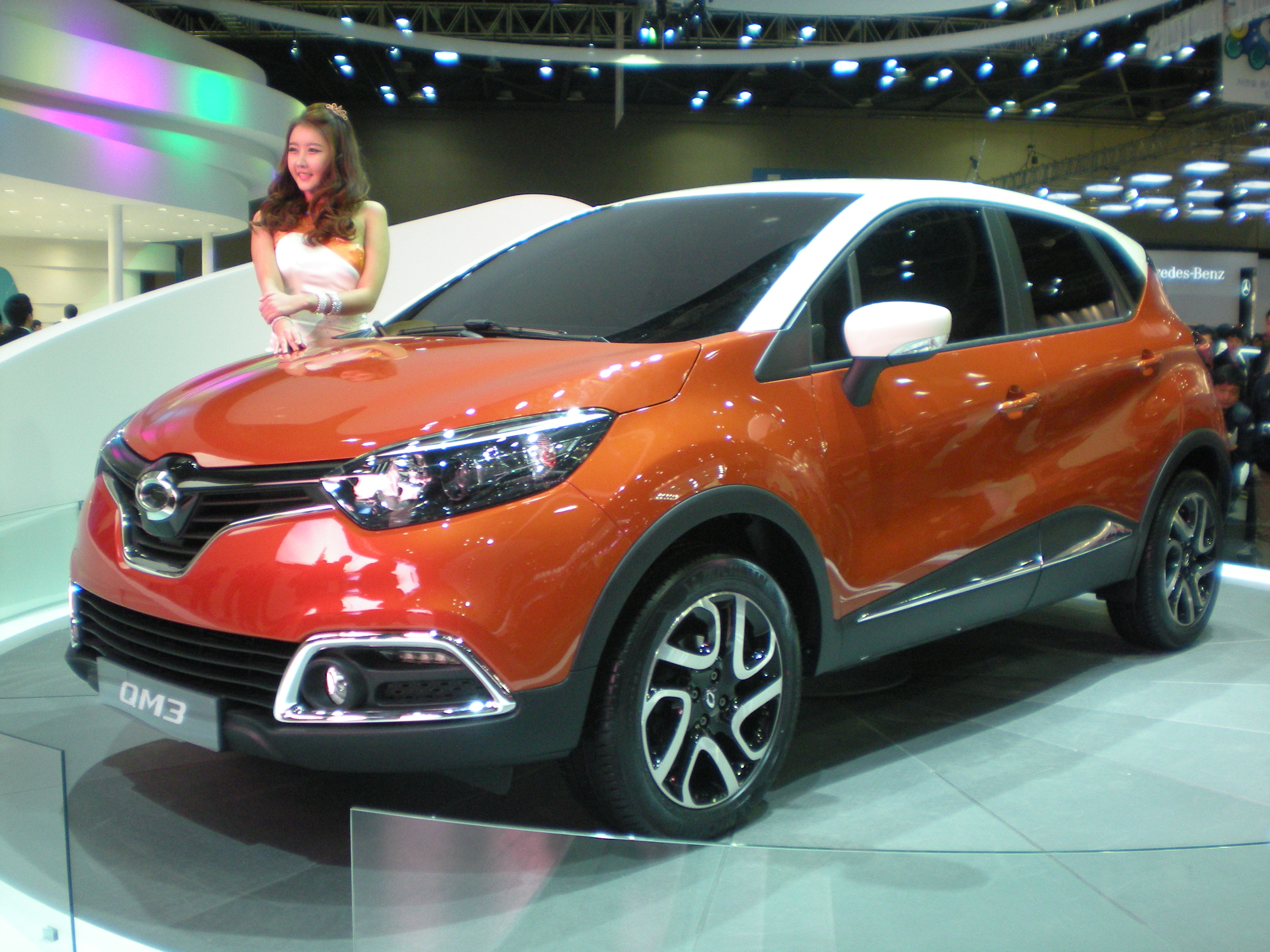 ルノーサムスン・QM3